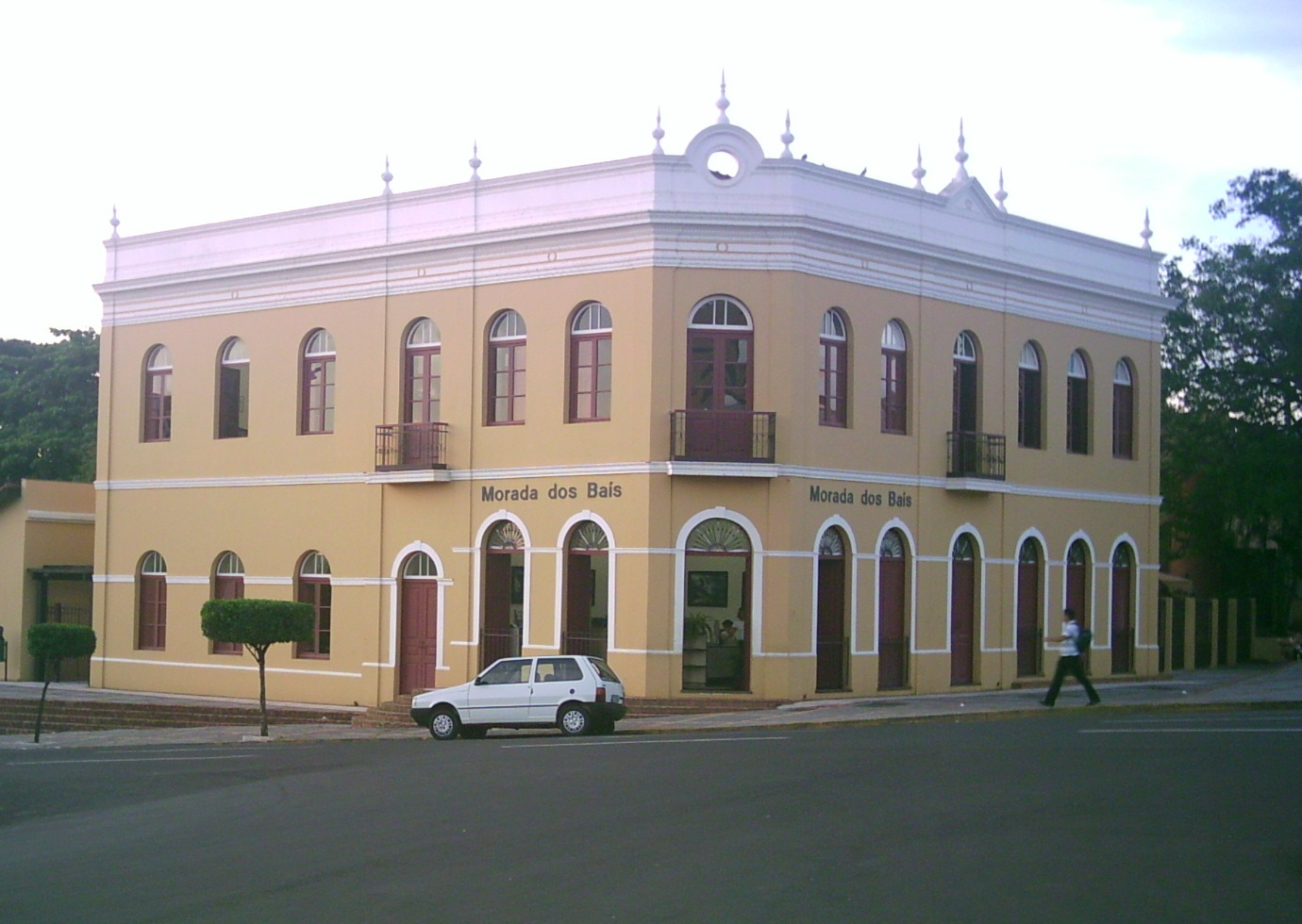 Foto da Morada dos Baís - Campo Grande